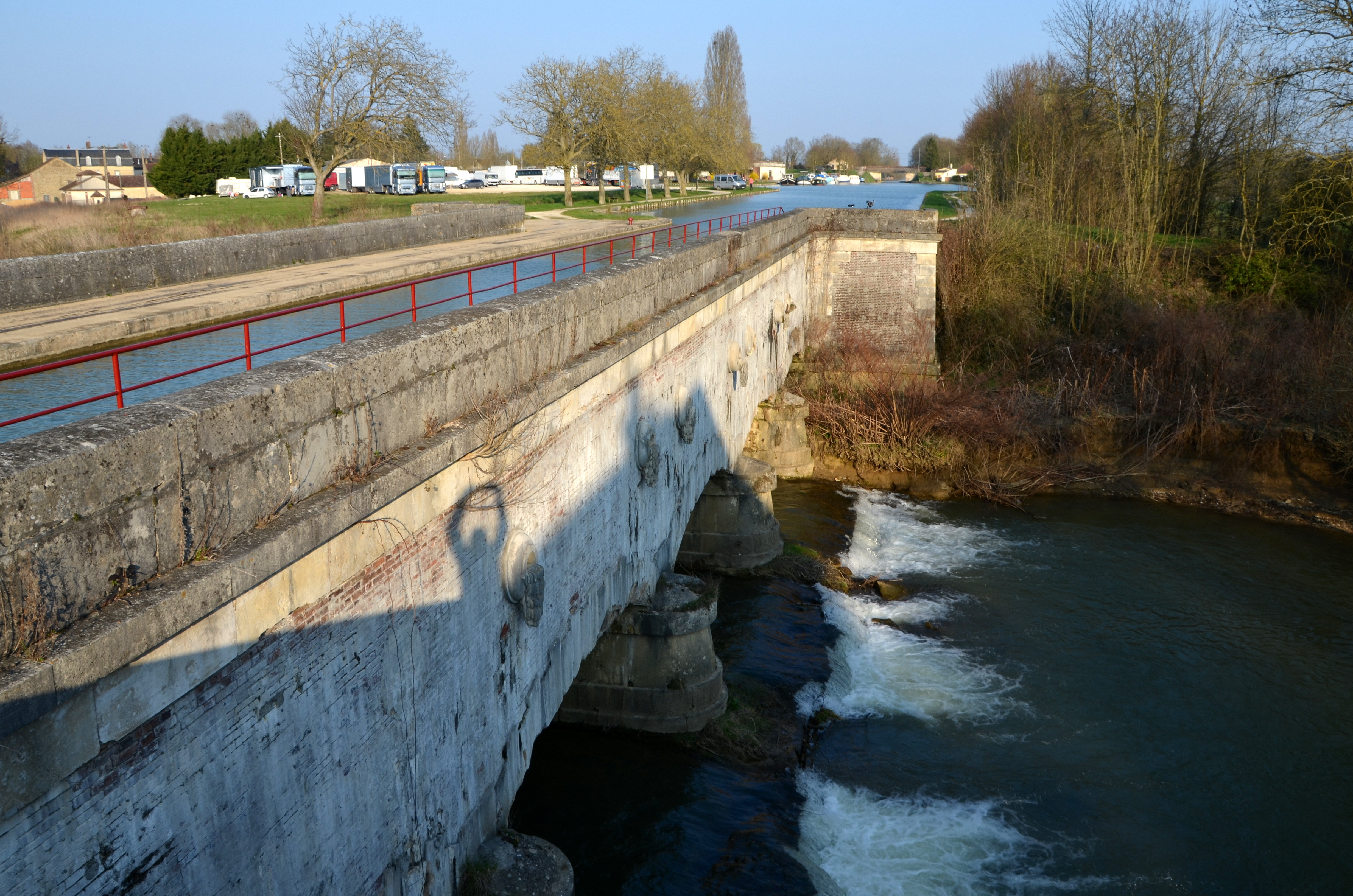 Canal de Bourgogne : Pont-canal sur l'Armance, Saint-Florentin, Bourgogne, France.